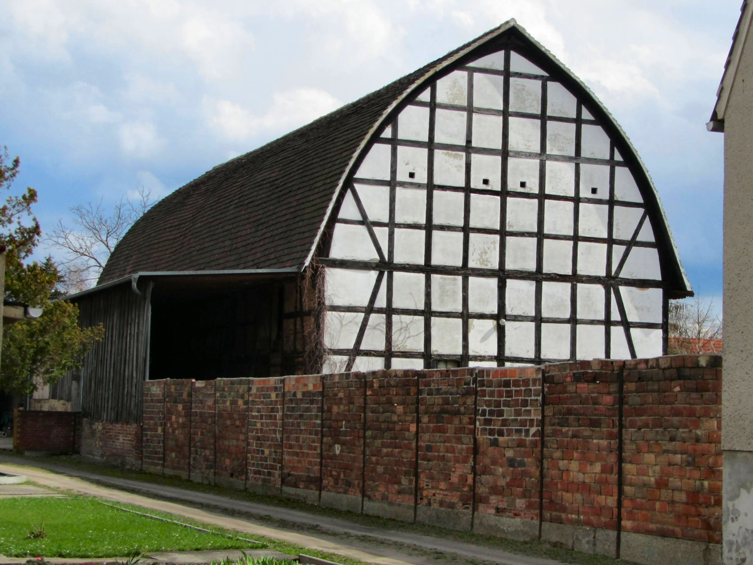 Dessau-Mildensee, Nordmann's Schafstall. Erhaltenes Gebäude aus der Zeit von Christian Gebhard Nordmann.